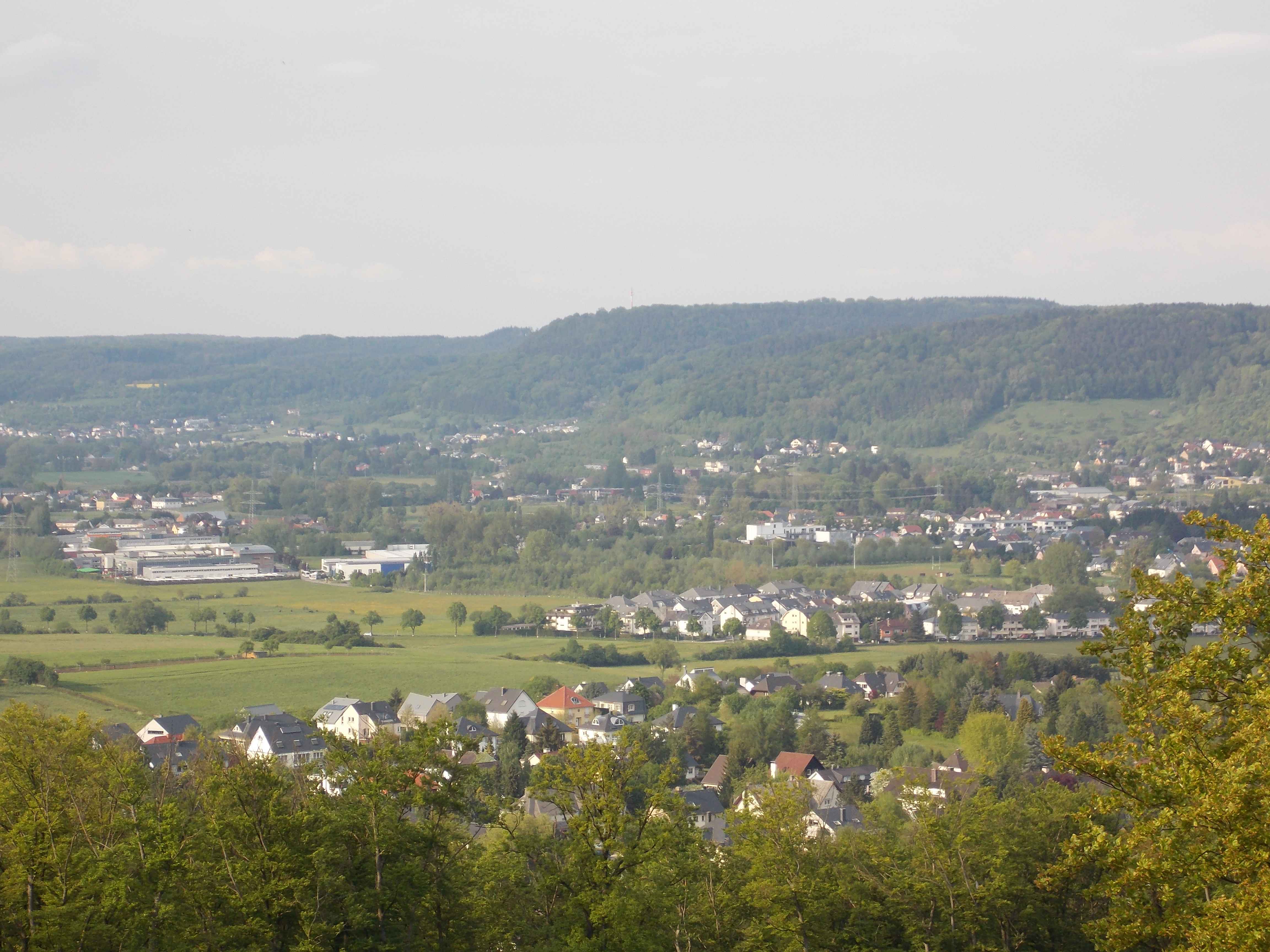 Blick vom Süden auf Bereldingen und Walferdingen